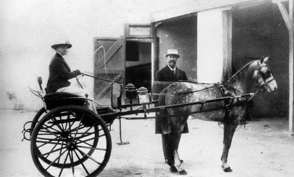 Александр Григорьевич Щербатов (1850—24.04.1915) и его супруга Ольга Александровна, урождённая графиня Строганова (1857-1944)